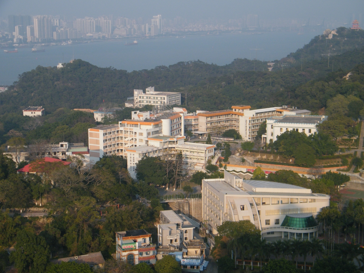 飘然亭上看金山中学